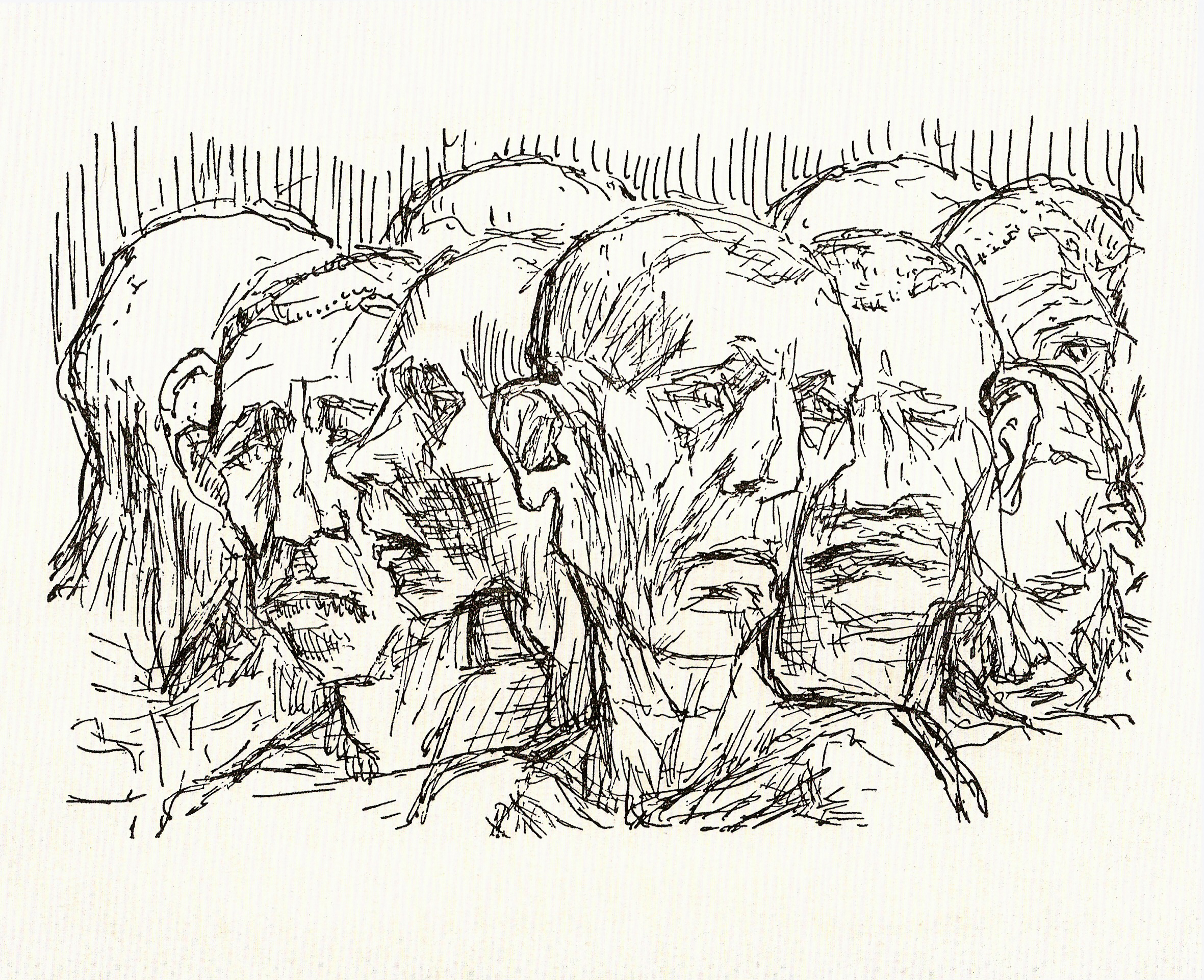 Dystrophikergruppe (Die dauerhaft unterernährten Kriegsgefangengen; Zeichnung)